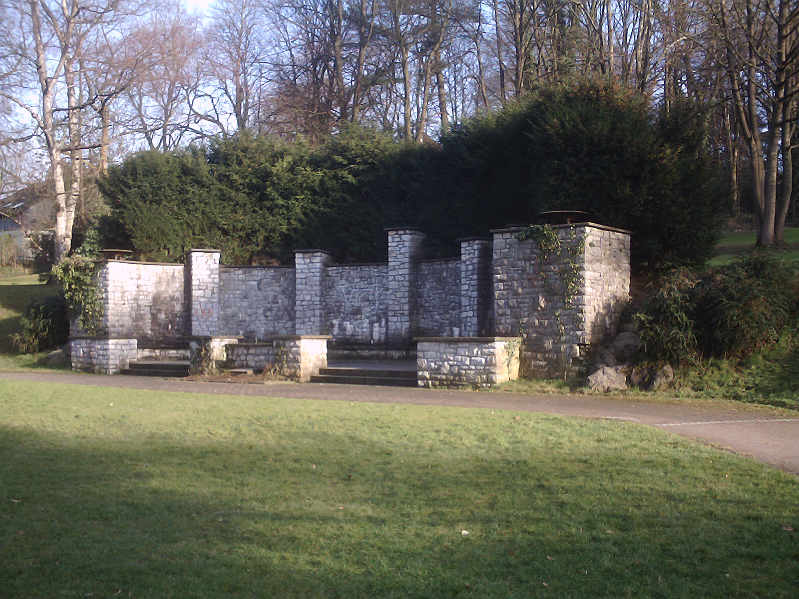 Denkmal